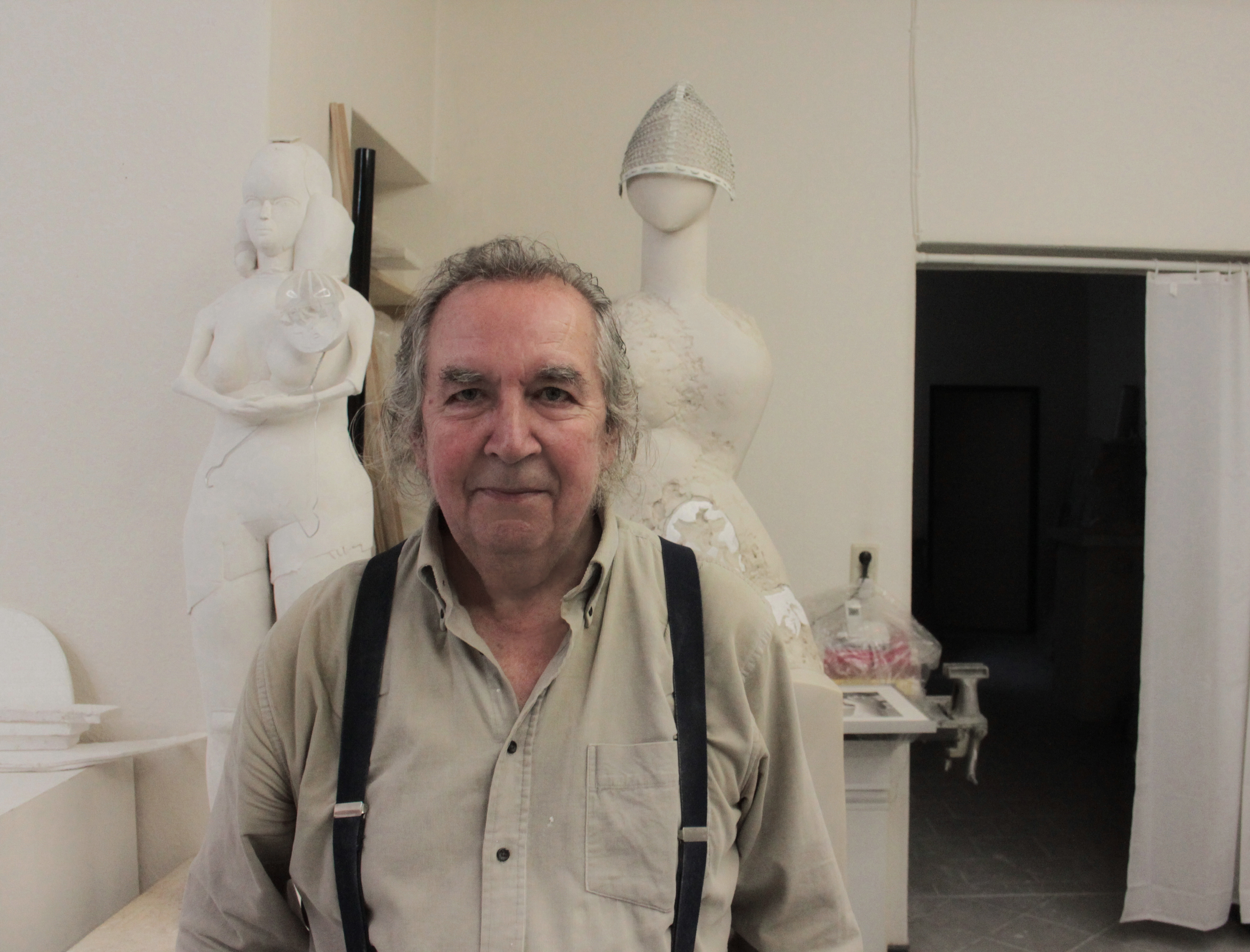 Bildhauer